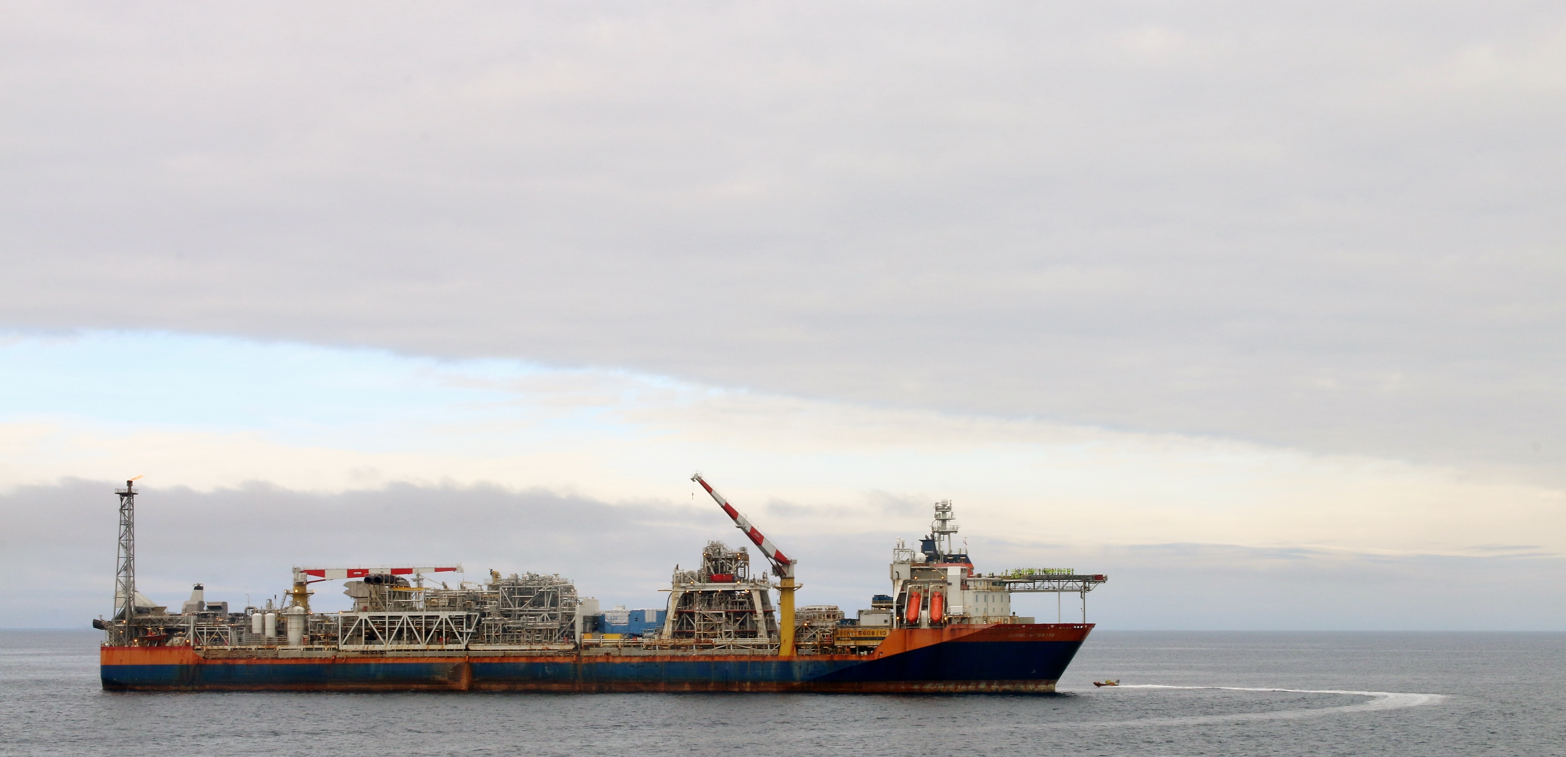 Vanndypet på Nornefeltet er 380 meter og feltet er bygd ut med et produksjons- og lagerskip tilknyttet brønnrammer på havbunnen. Foto: Øyvind Knoph Askeland, Norsk olje og gass